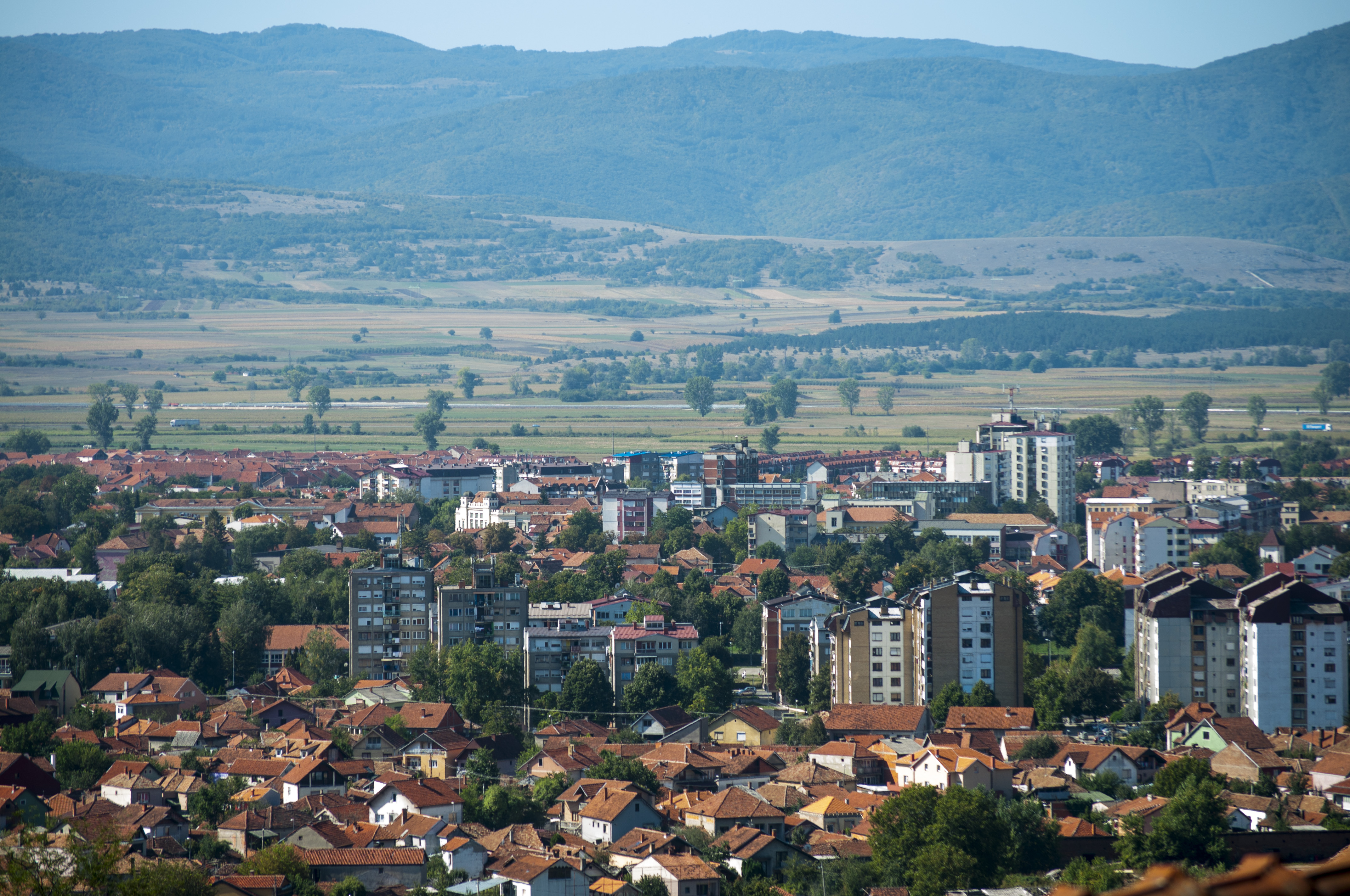 Поглед на Пирот